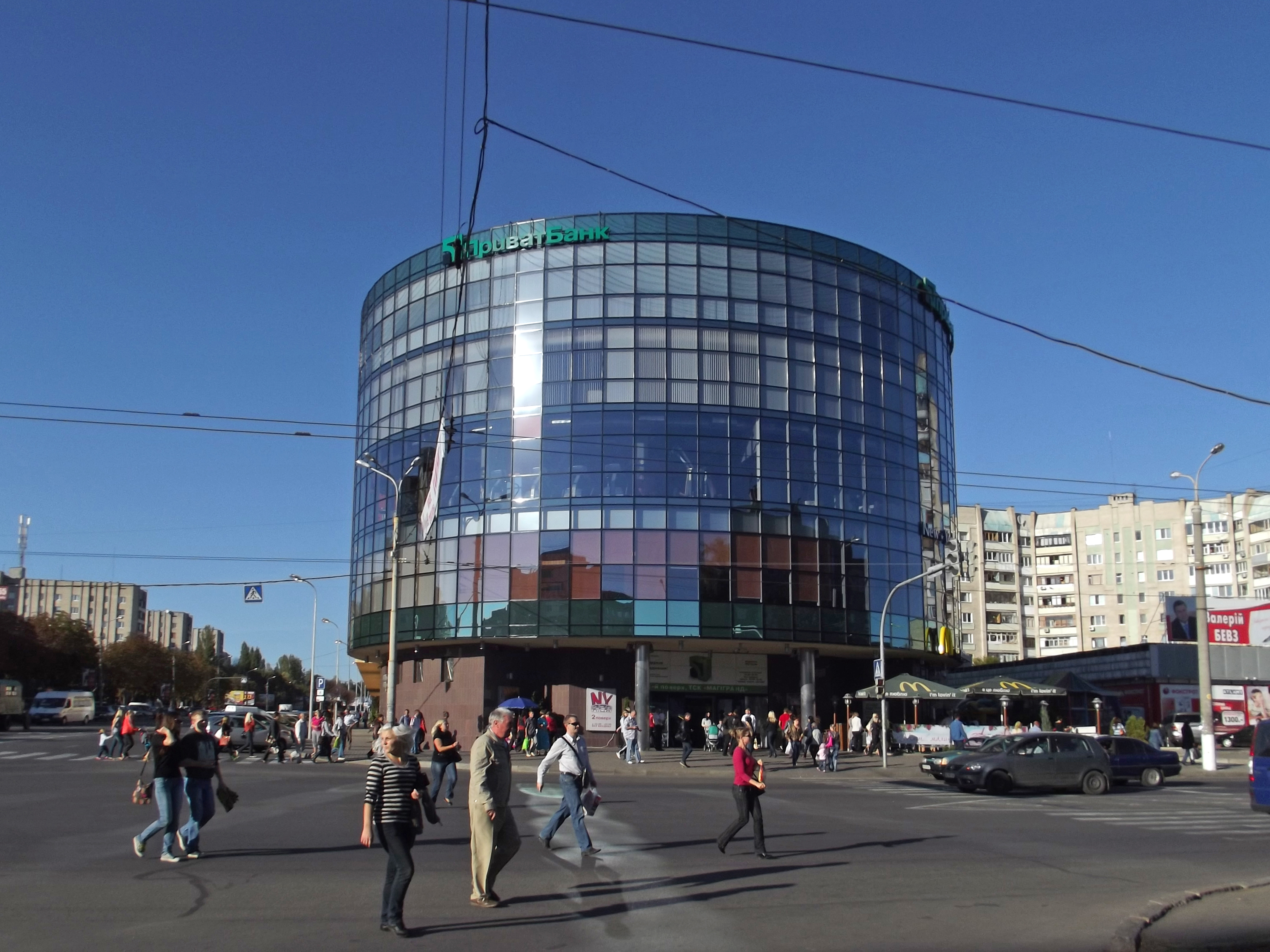 Торговый центр